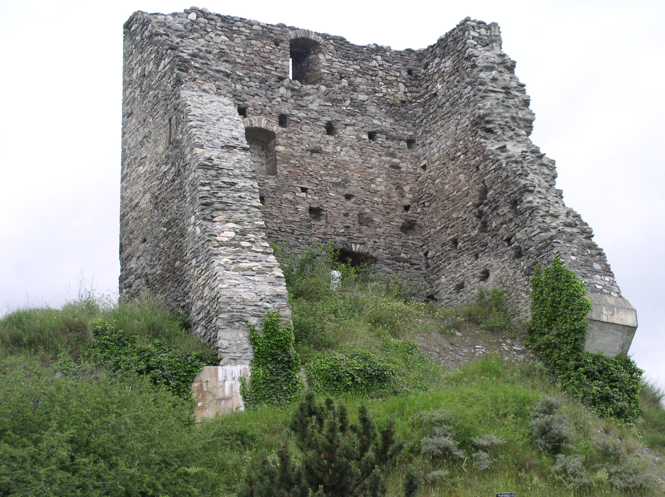 Tour de Chalais, Valais, Switzerland